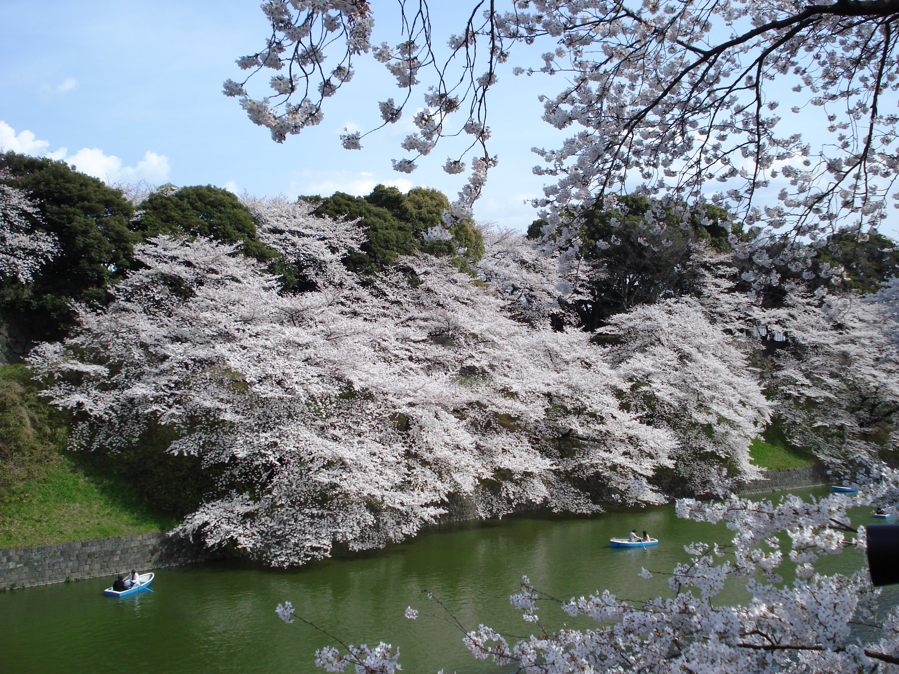 Sakura, Chidorigafuchi moat, Tokyo Imperial Palace.